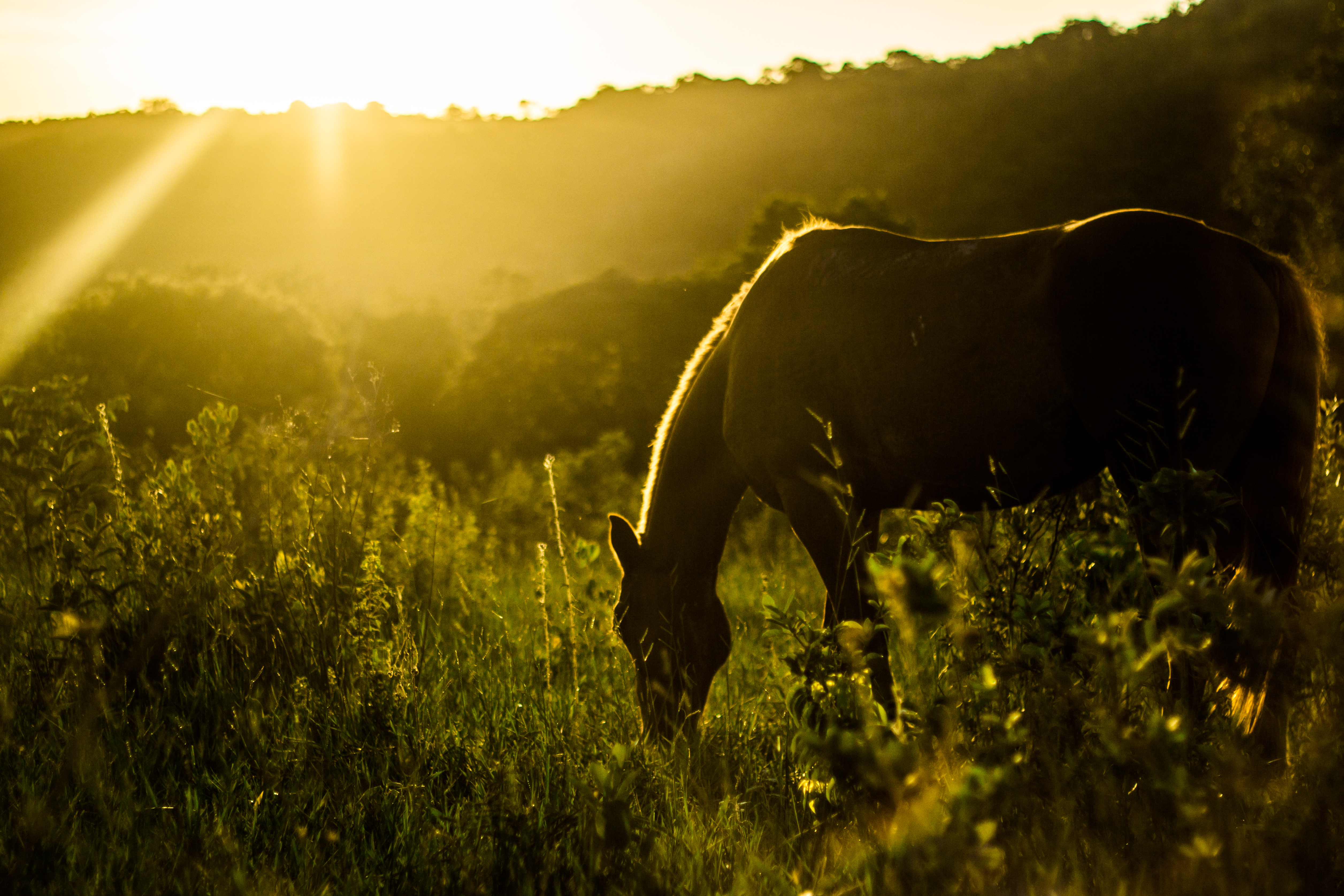 Imagem de um cavalo na cidade de Paraíso no Mato Grosso do Sul